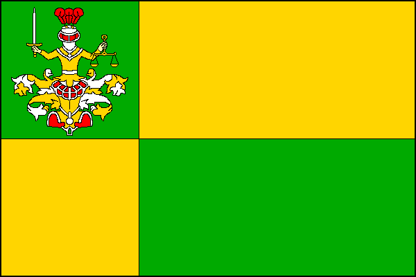 vlajka, Horní Maršov, okres Trutnov